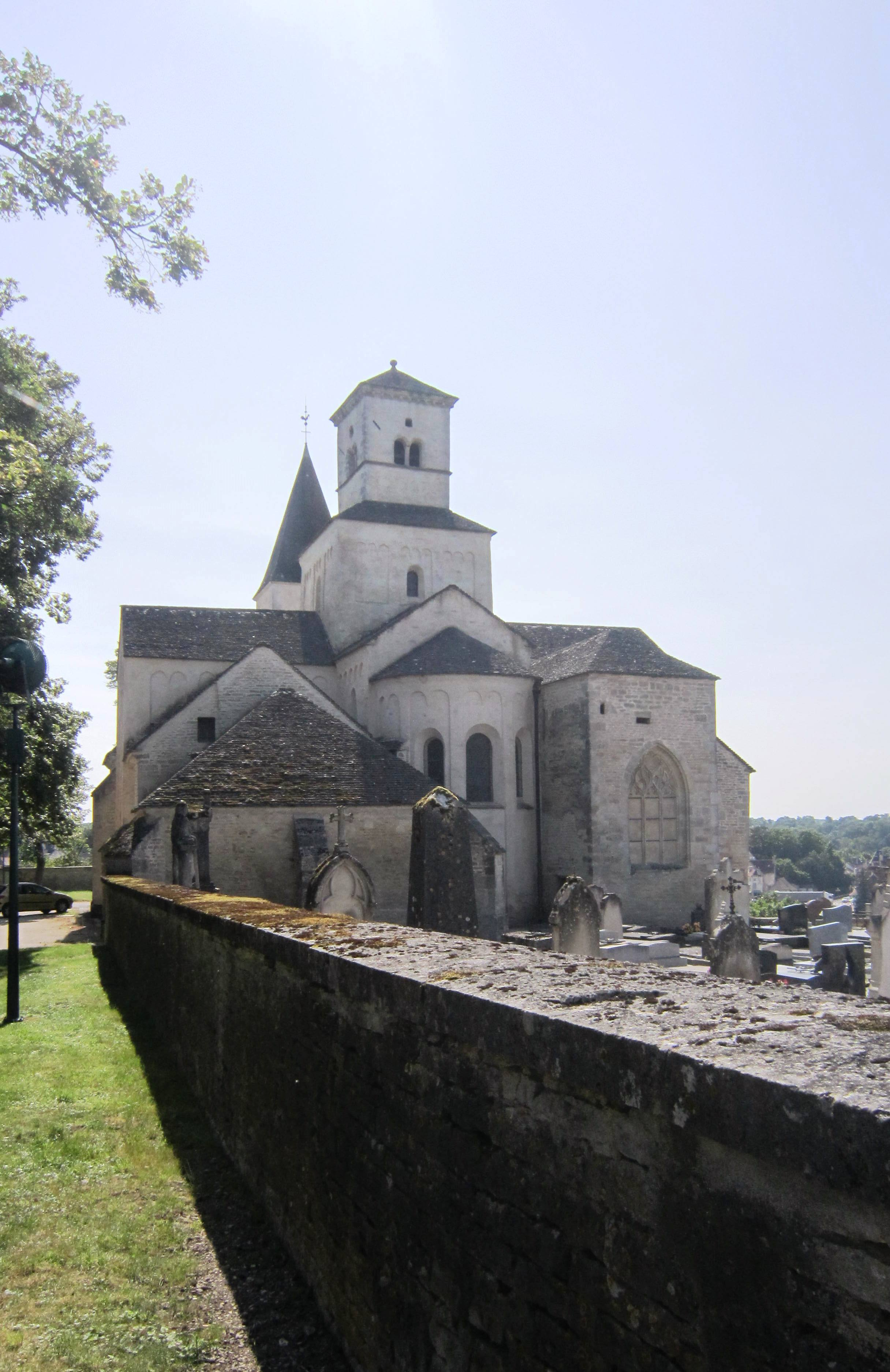 Eglise Saint-Vorles de Châtillon-sur-Seine (France).